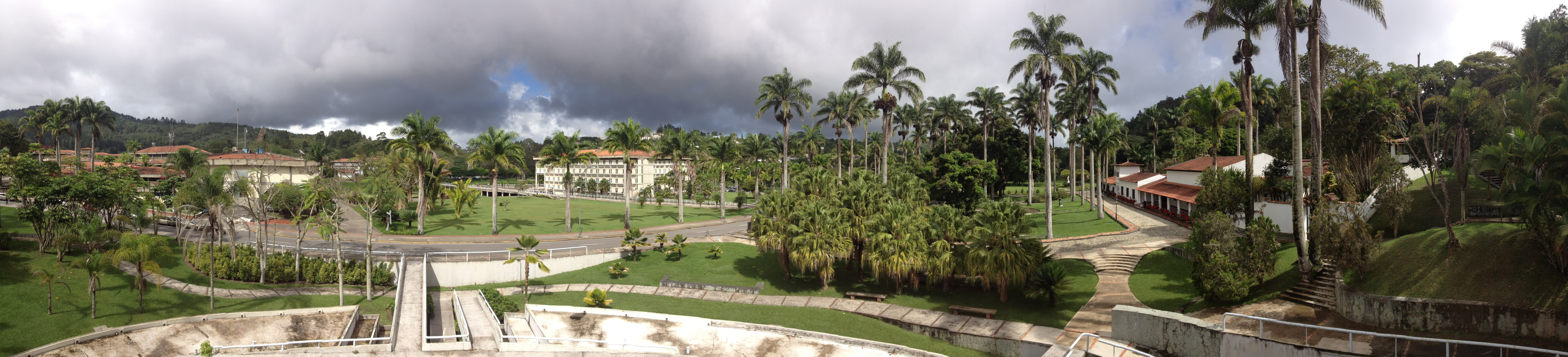 Una vista panorámica en la parte superior de la fuente, donde se aprecia los jardines, la biblioteca central y la casa rectoral de la USB.